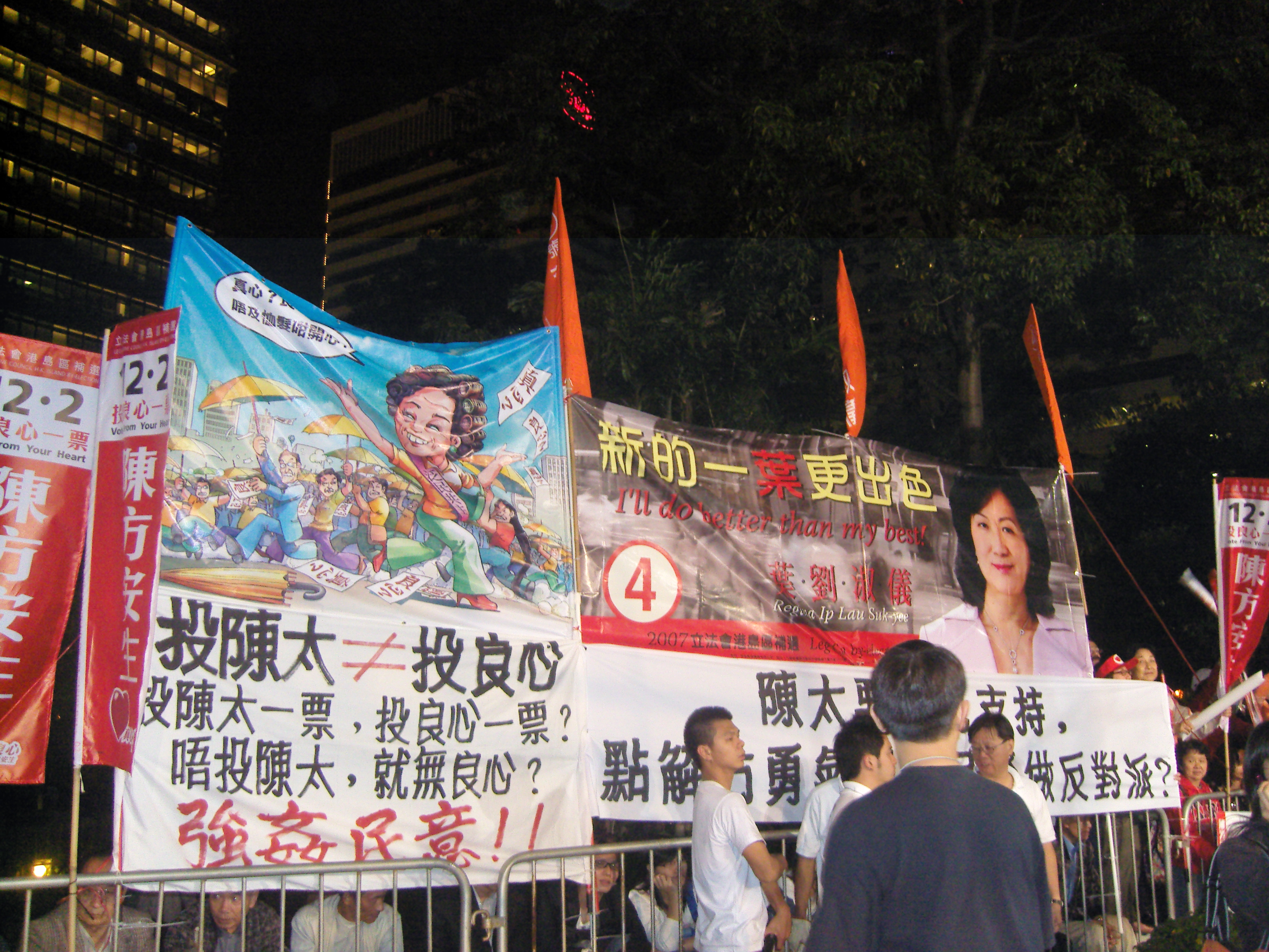 香港立法會港島區補選八大傳媒選舉論壇。